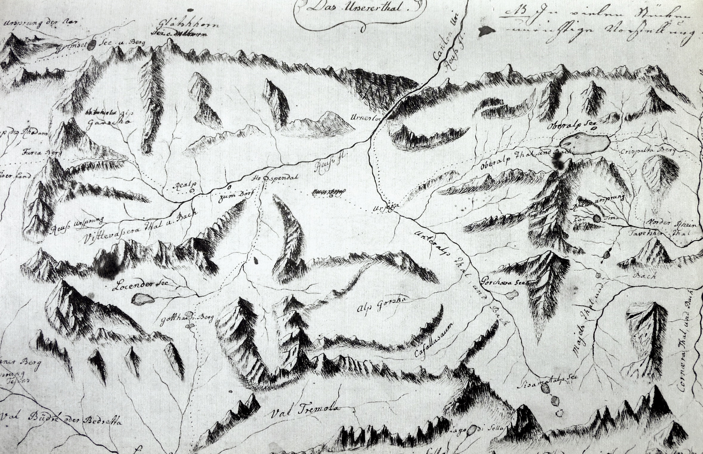 Karte des Urserentales, undatiert, 19x29 cm